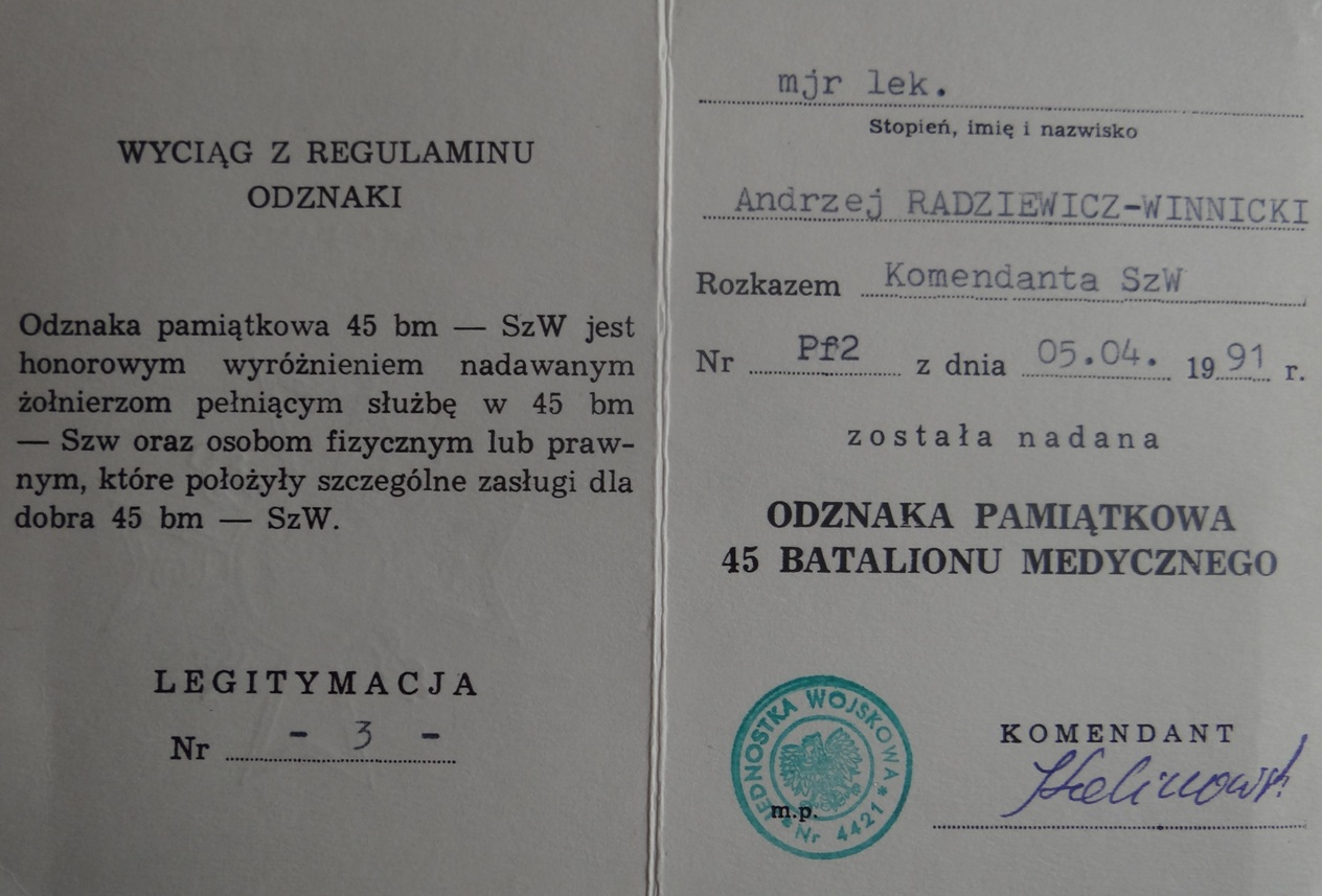 Legitymacja odznaki pamiątkowej 45 Batalionu Medycznego